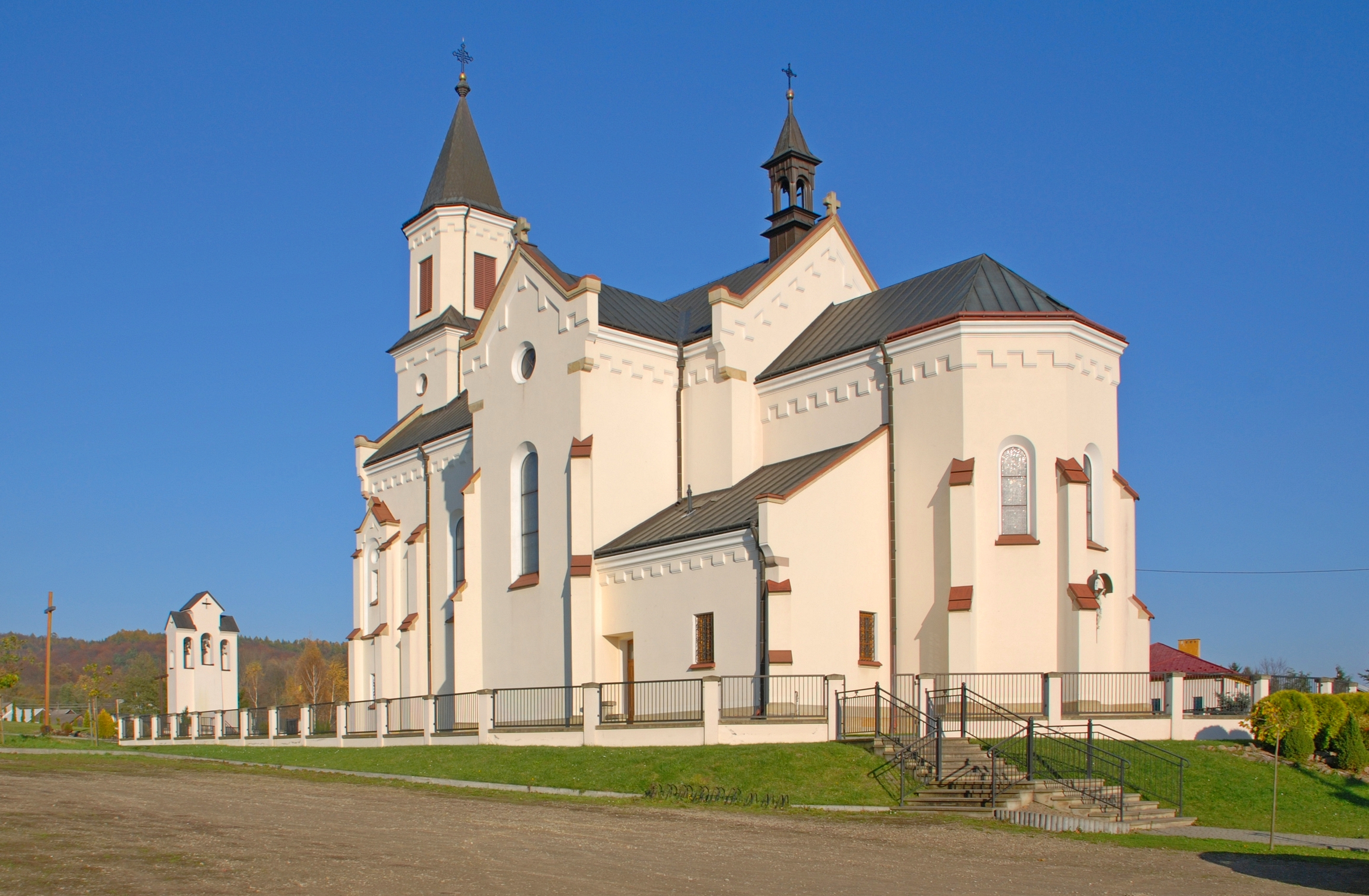 wieś Warzyce (województwo podkarpackie) Wikidata has entry Q30513098 with data related to this item.